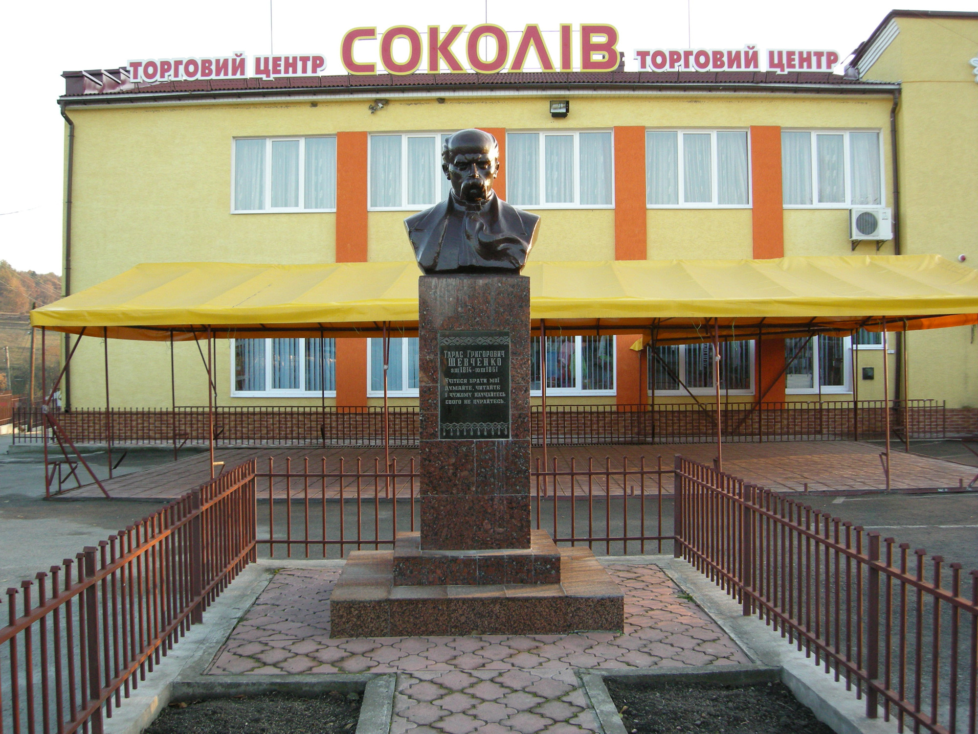 Пам'ятник поету, письменнику, художнику Тарасові Шевченку в селі Соколів Бучацького району Тернопільської області (2011 р.).